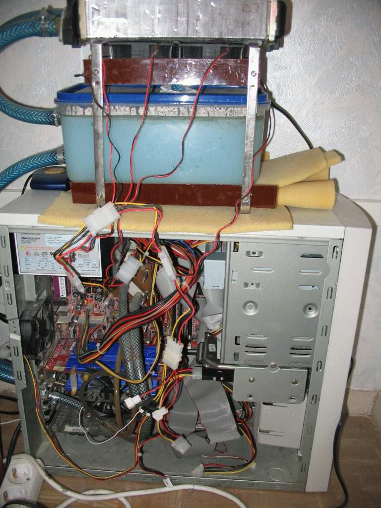 самодельная система водяного охлаждения